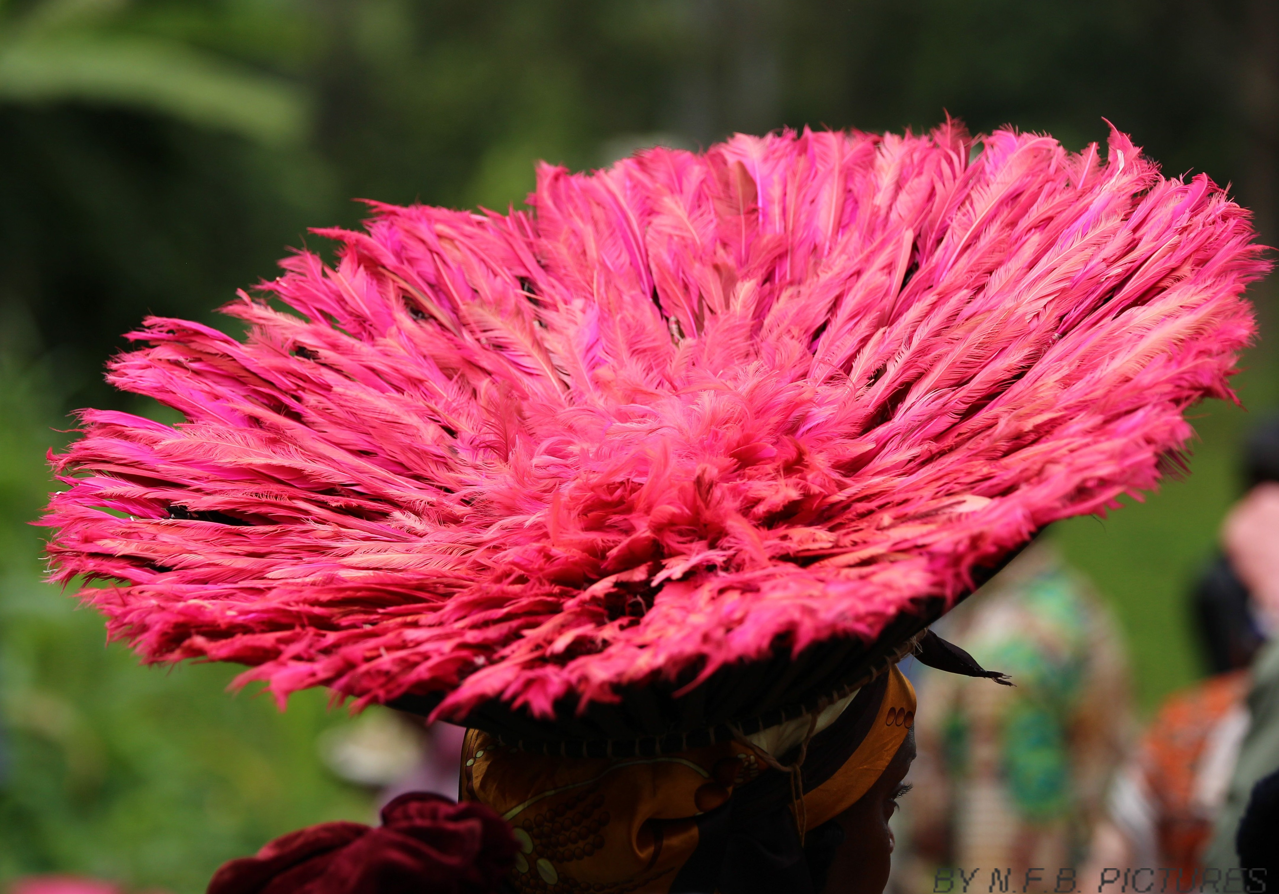 Chapeau de prestance BAMILEKE